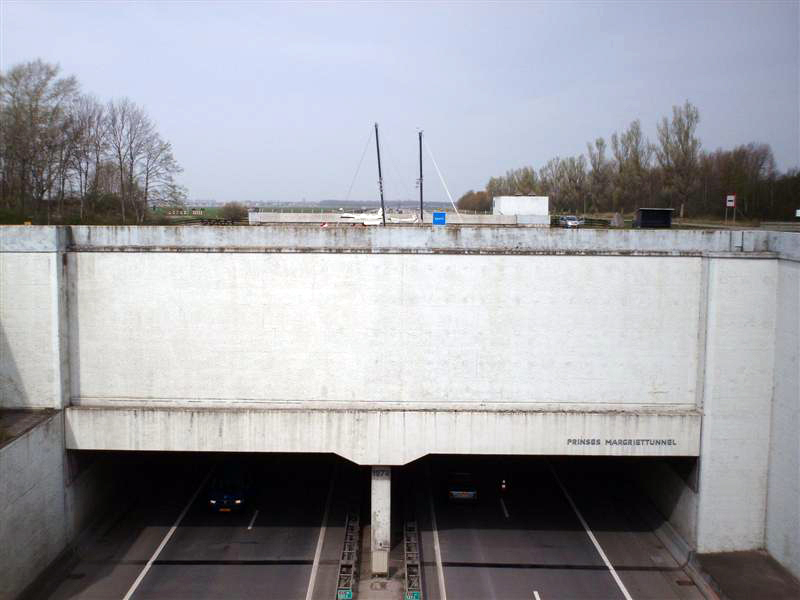 Prinses Margriettunnel (aquaduct) bij Uitwellingerga.